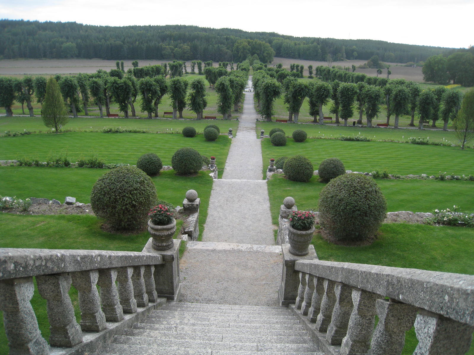 Barockträdgården till Venngarns slott i Sigtuna kommun, Uppland. Magnus Gabriel De la Gardie lät också anlägga barockträdgården, som sannolikt ritades av Jean de la Vallée.